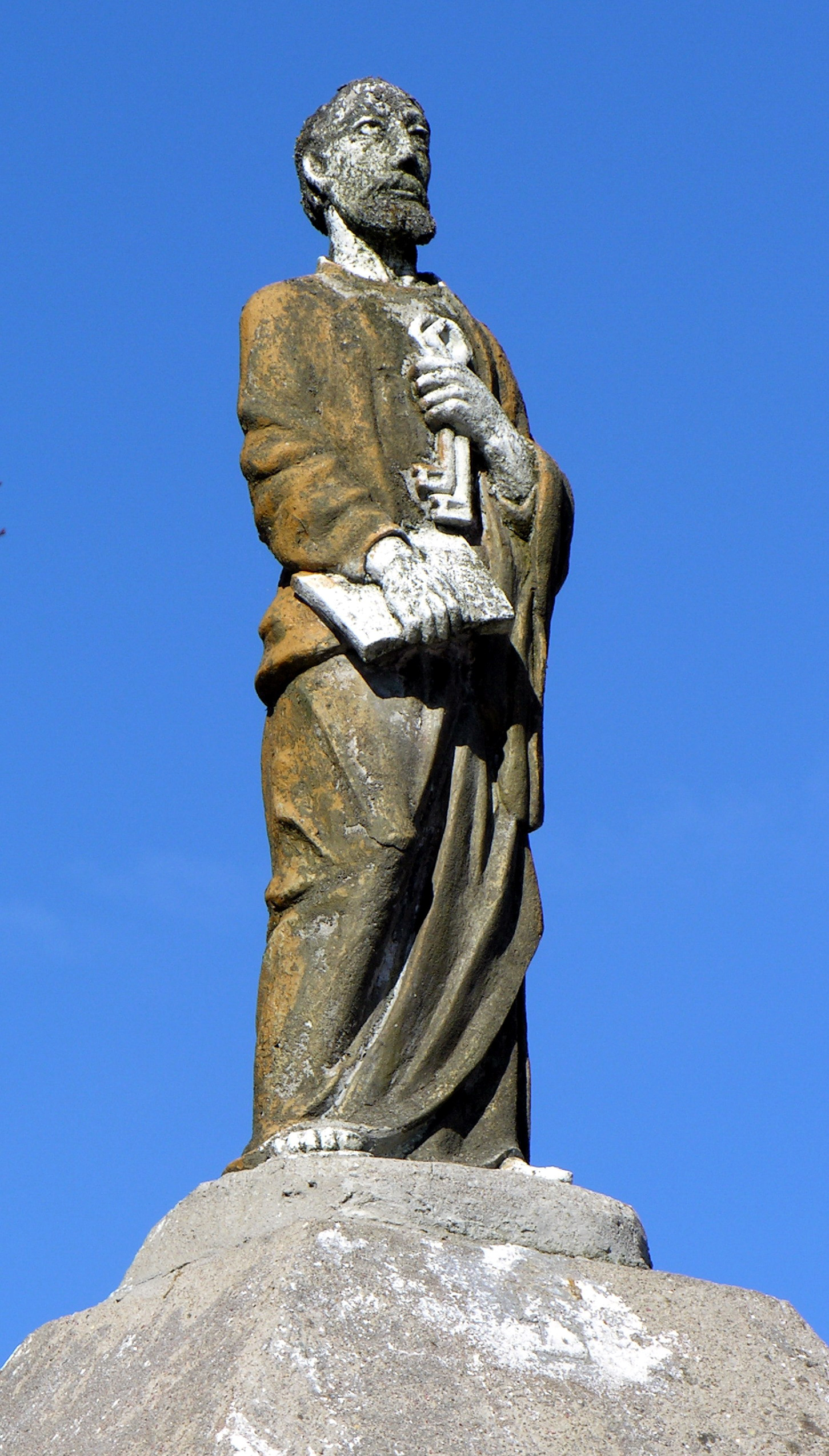 Šv. Petras 2007 m. balandžio 1 d., Lietuva